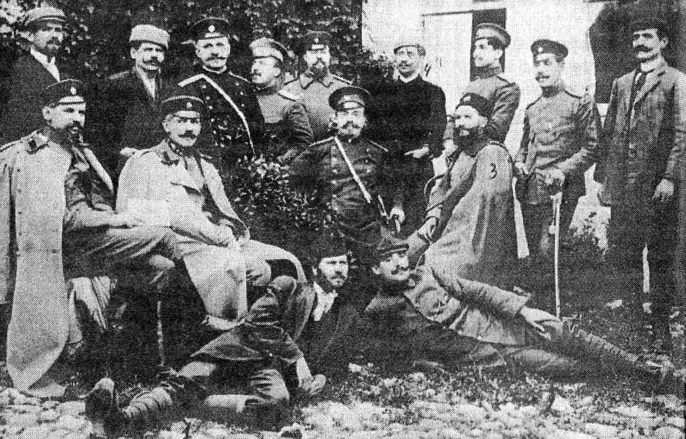 Костурски войводи, снимани през април 1913 година в Ксанти преди заминаването на Сборната партизанска рота на Македоно-одринското опълчение. Трайко Желевски от Желево (легналият отляво), Тома Янакиев от Желин (легналият отдясно), Георги Шкорнов (Дякон Евстатий) от Нестрам (четвърти седнал), Андон Юруков от Лабаница (първи прав), Пандо Сидов от Жупанища (шести прав).